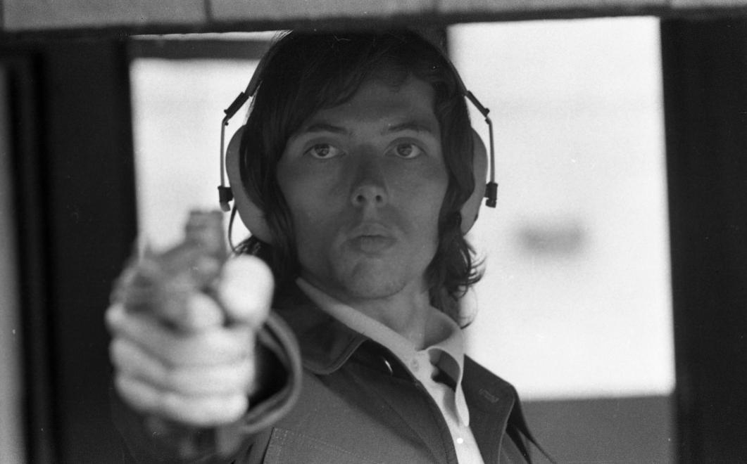 Kancsal Tamás olimpiai bronzérmes világbajnok magyar öttusázó, edző.